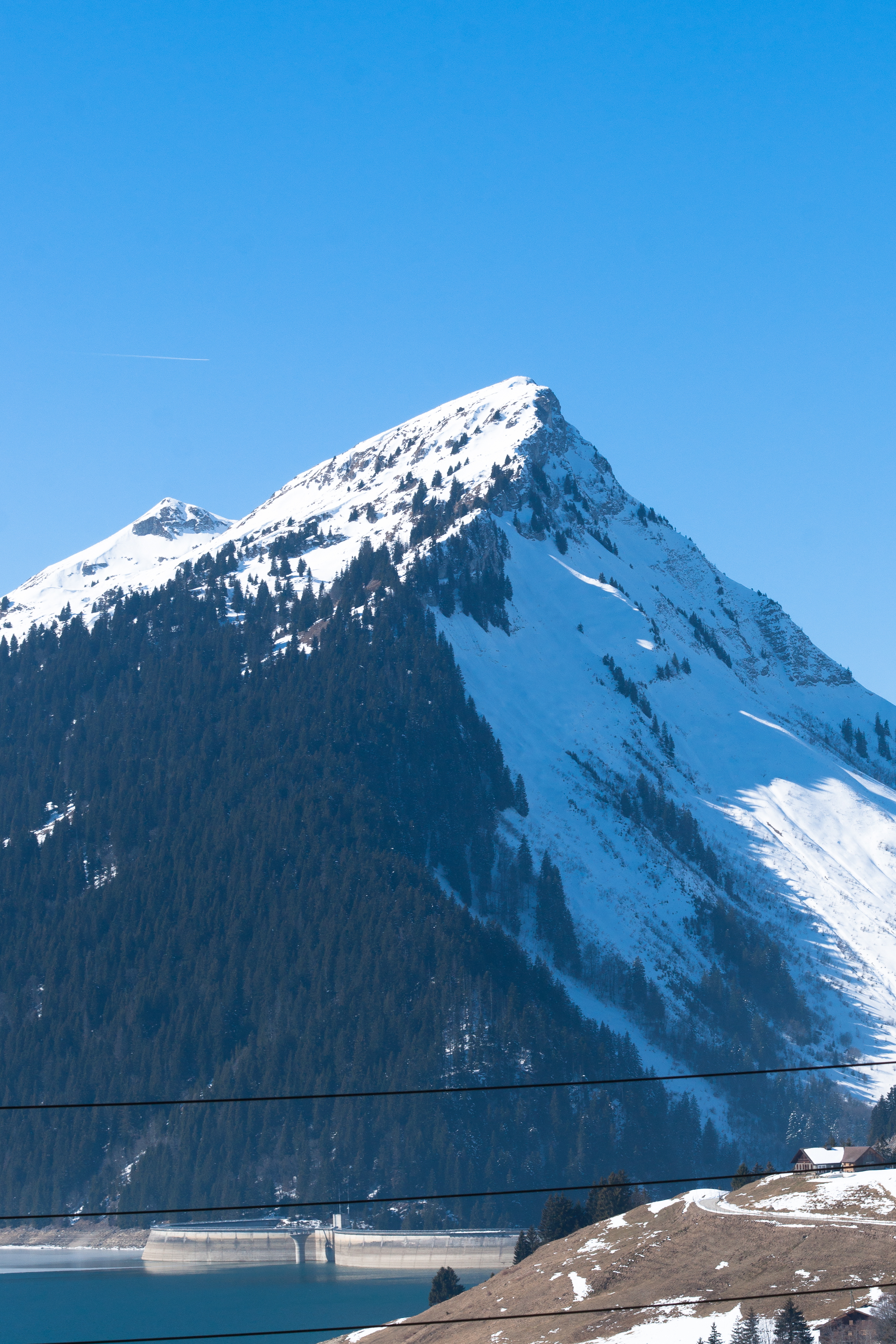 La Pointe d'Aveneyre vue depuis la route de la Lécherette